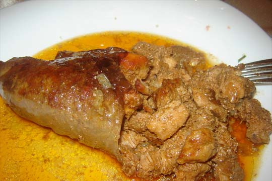 Специјалитет кој е наследен од ориенталната кујна. Ширденот како јадење е чисто прилепско јадење и за сите гурмани е голем предизвик.